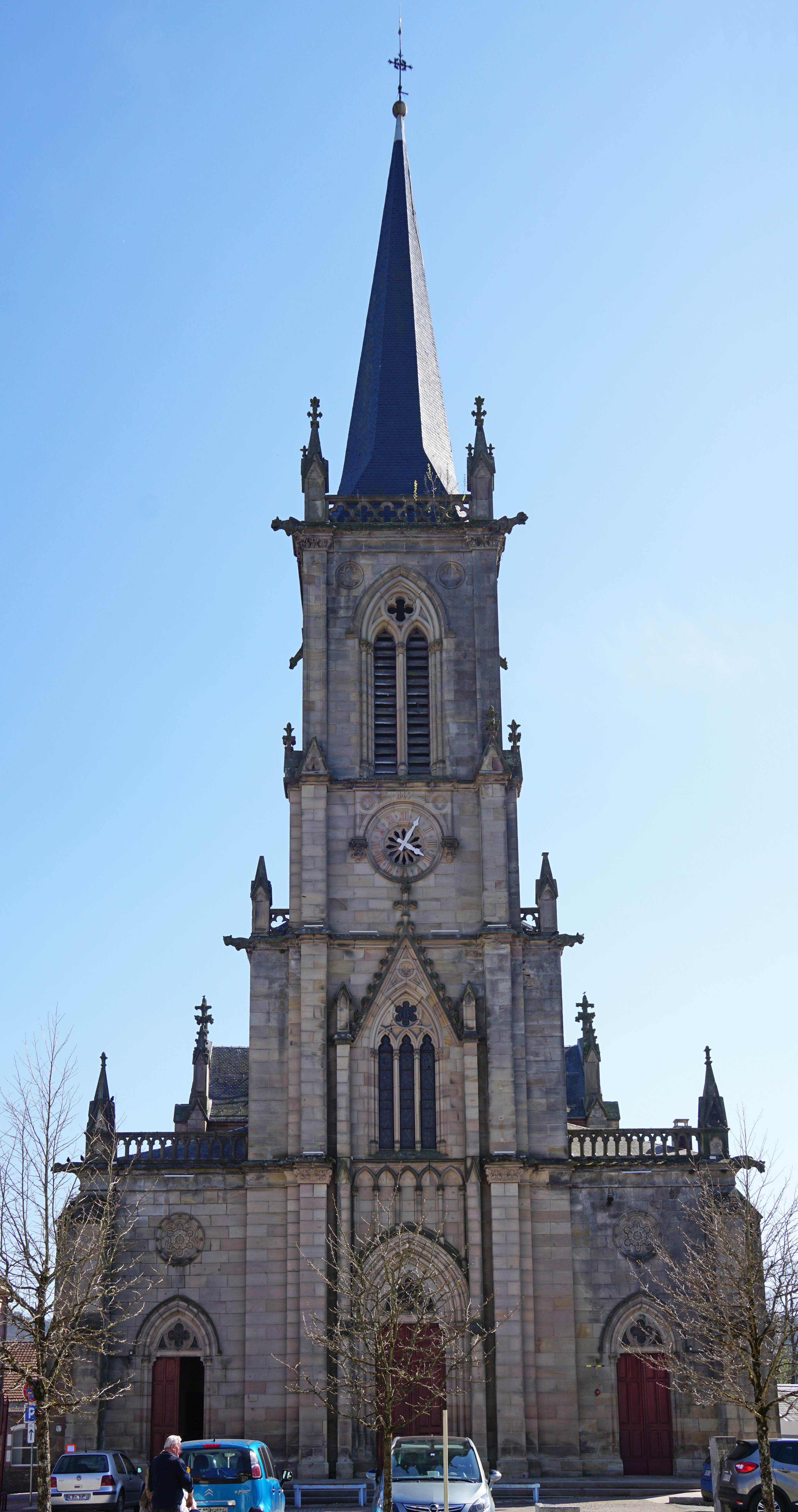 Église Notre-Dame-du Bas de Ronchamp